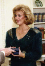 Susan Akin